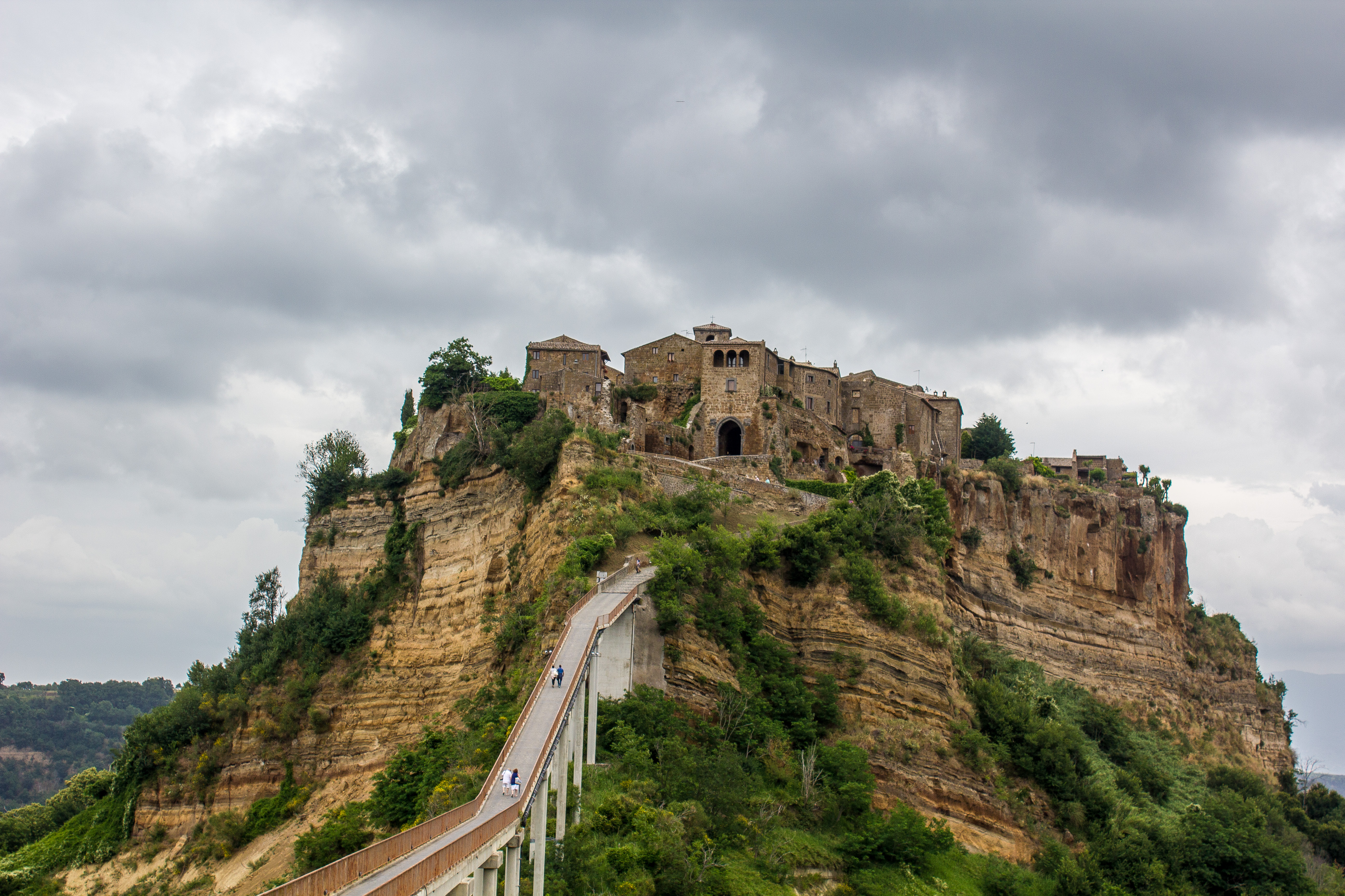 Lazio, Italy 2015.